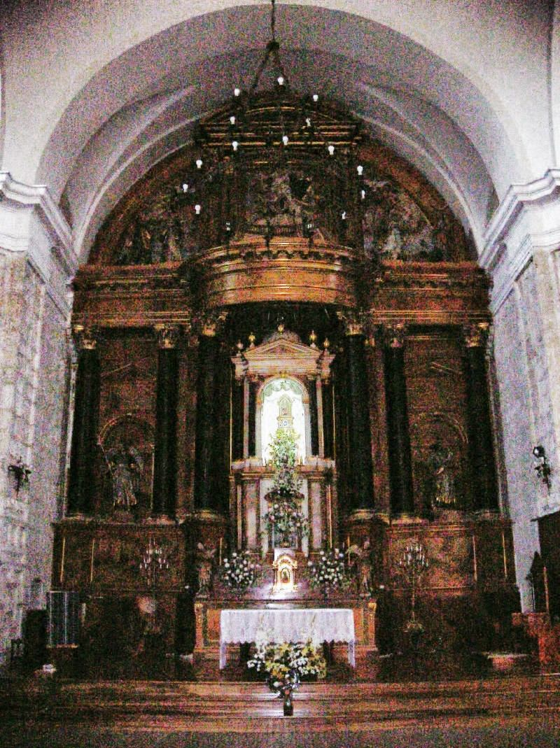 Retablo del Altar Mayor del Santuario y Monasterio de monjas Cistercienses de Nuestra Señora de Alconada (siglo XVIII), en las proximidades de Ampudia, Palencia, España/Spain